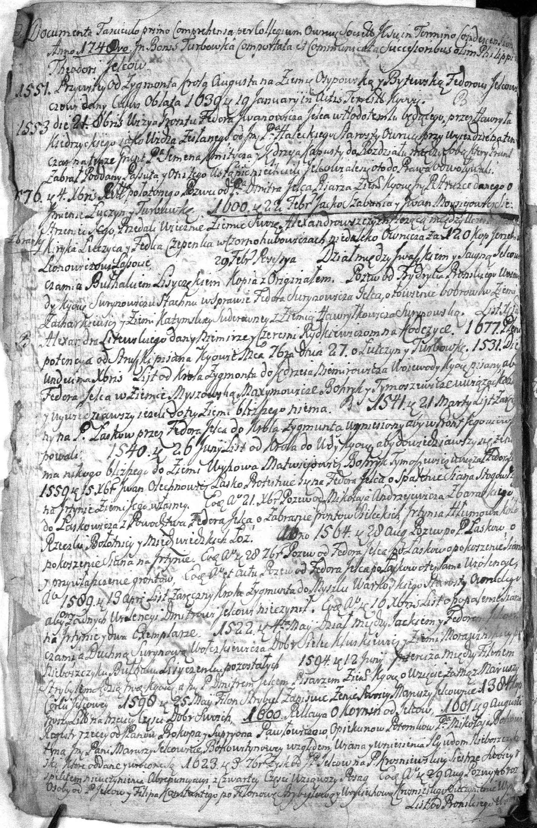 Lwowska Naukowa Biblioteka im. W. Stefanyka NAN Ukrainy. Oddział Rękopisów. Zespół (fond) 5. RĘKOPISY BIBLIOTEKI ZAKŁADU NARODOWEGO IM. OSSOLIŃSKICH 4144/III. Archiwum lipowieckie Junosza-Rościszewskich. Sumariusze i regestry. XVIII w. K. 197. Страница 162. Рукопись реестра документов архива панов Ельцов.